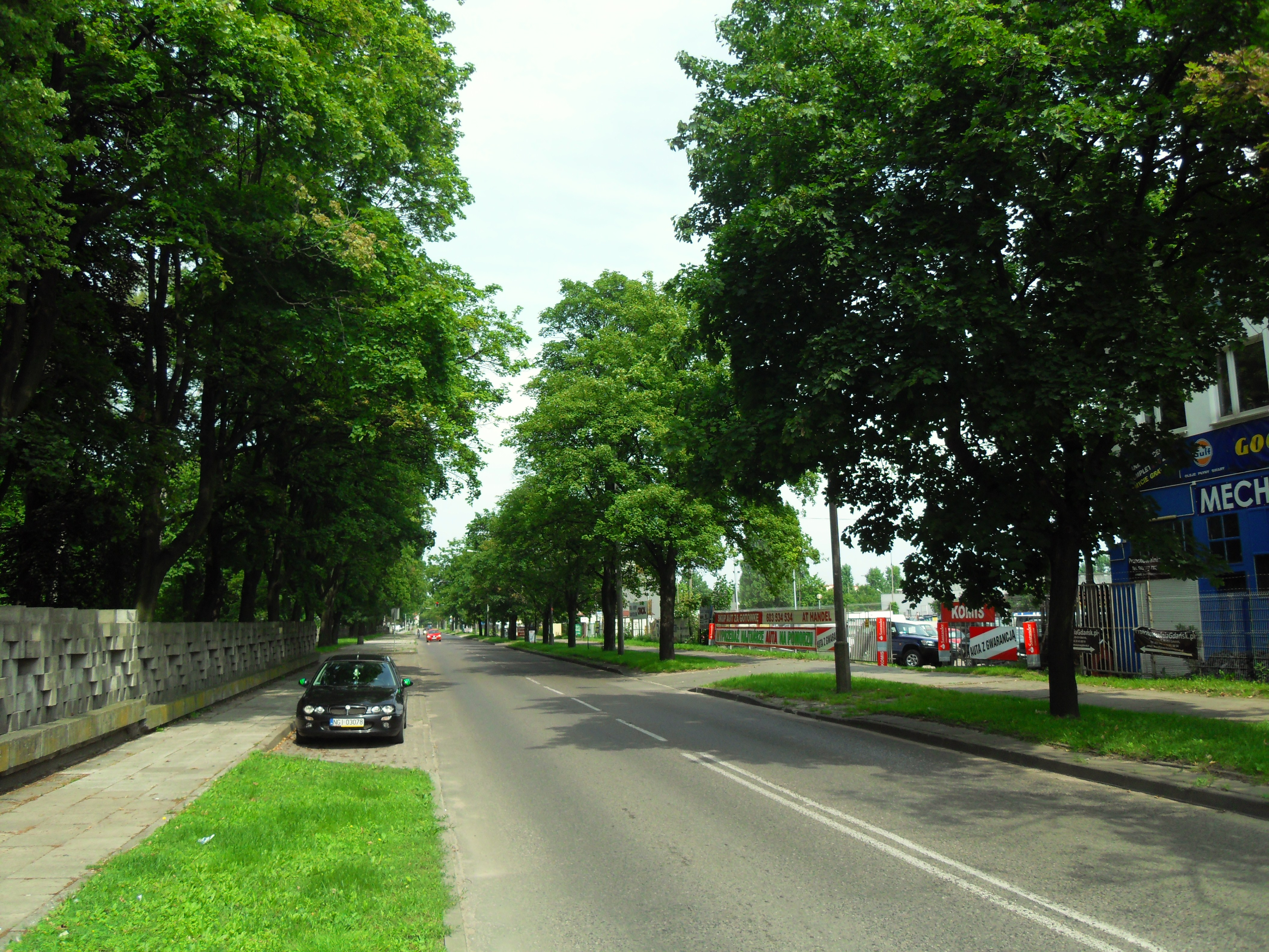 Gdańsk Wrzeszcz Dolny, ul. Chrobrego.